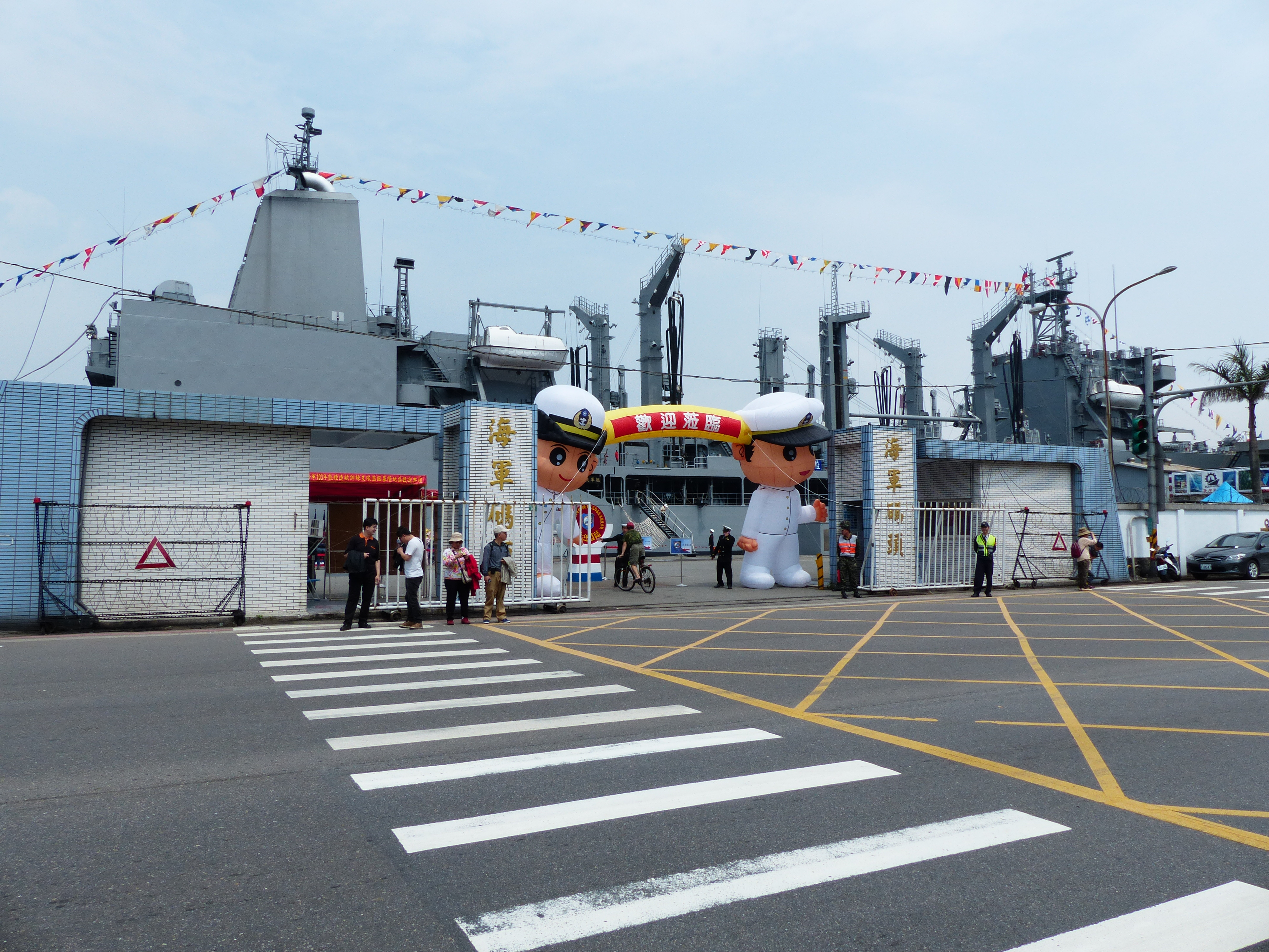 海軍敦睦支隊來訪日，開放參觀的基隆港東5號海軍碼頭入口。